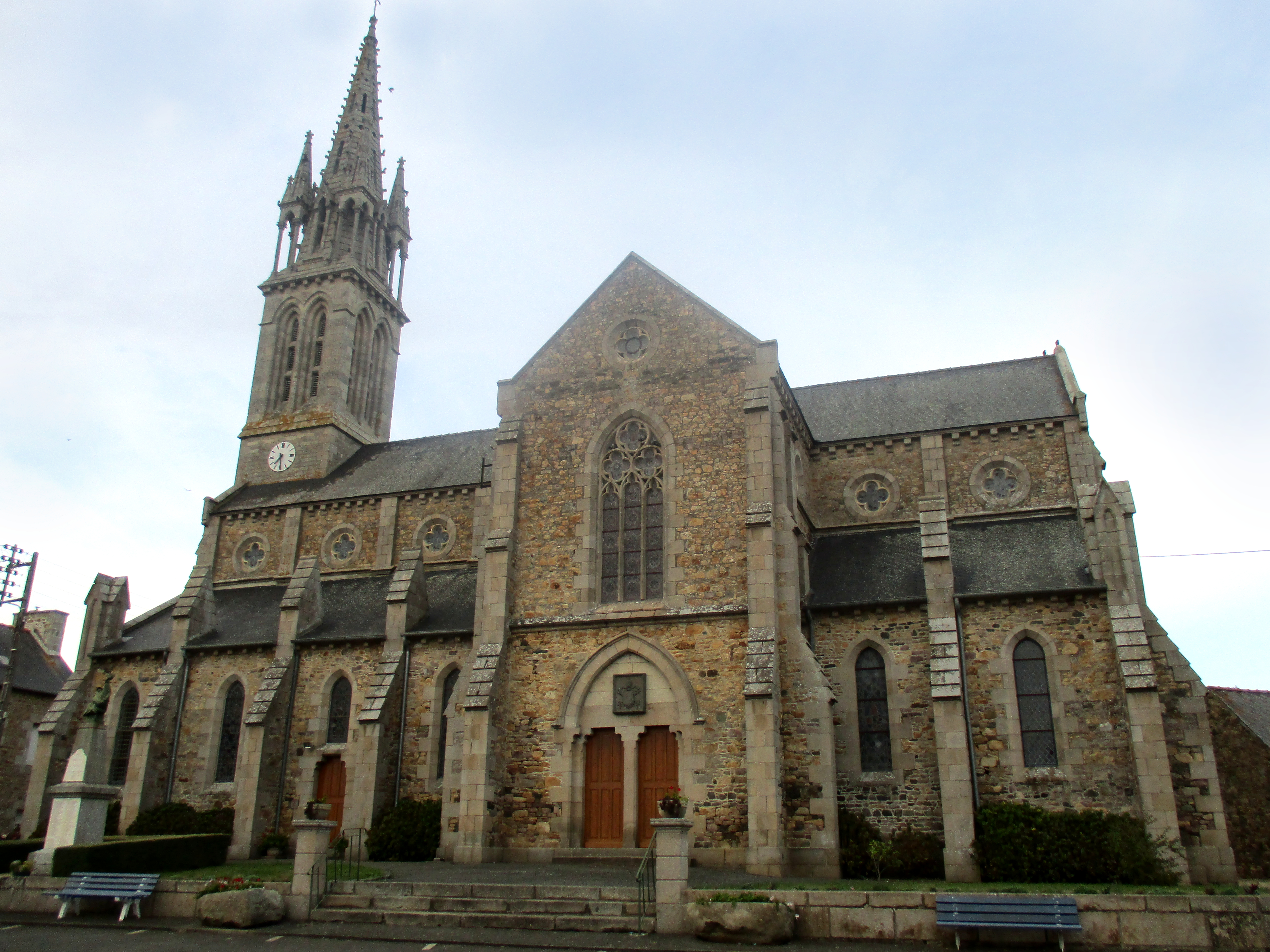 L'église Saint-Mayeux de Pludual